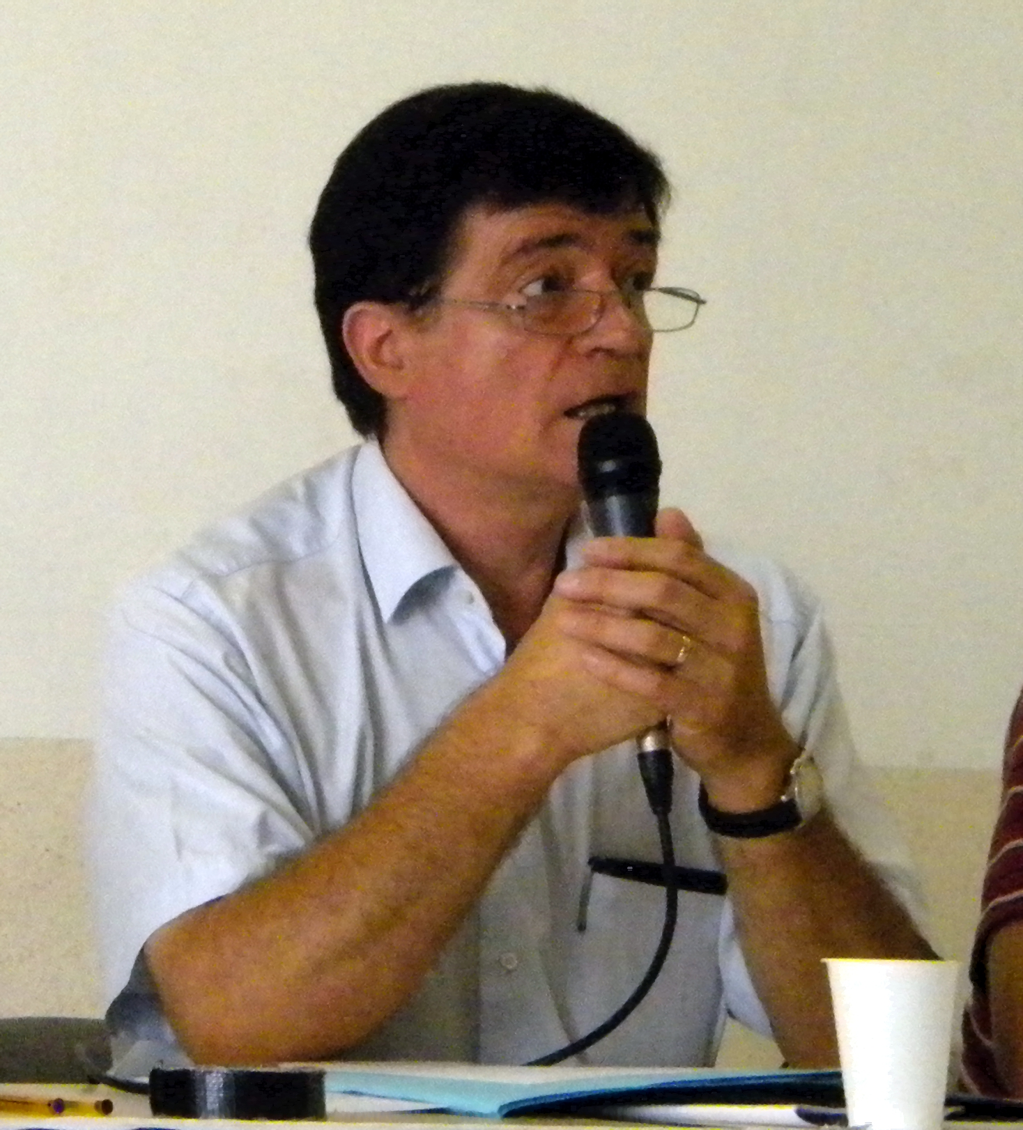 Gustave Alirol à Biarritz le 23 août 2012, lors de l'université d'été de Régions et peuples solidaires.